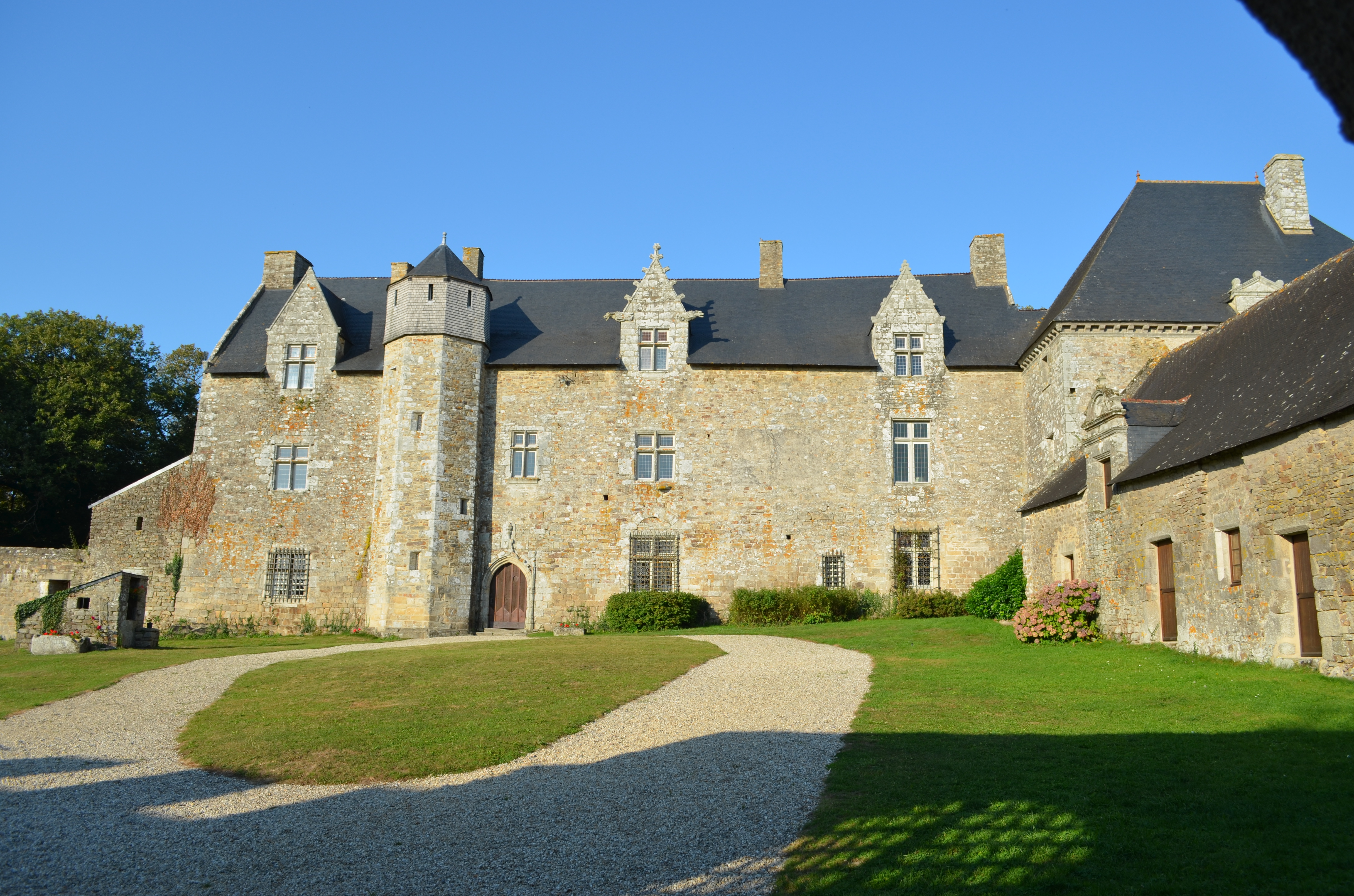 Château du Plessis-Josso (16e s. - 18e s.) - Theix This building is en partie classé, en partie inscrit au titre des Monuments Historiques. .